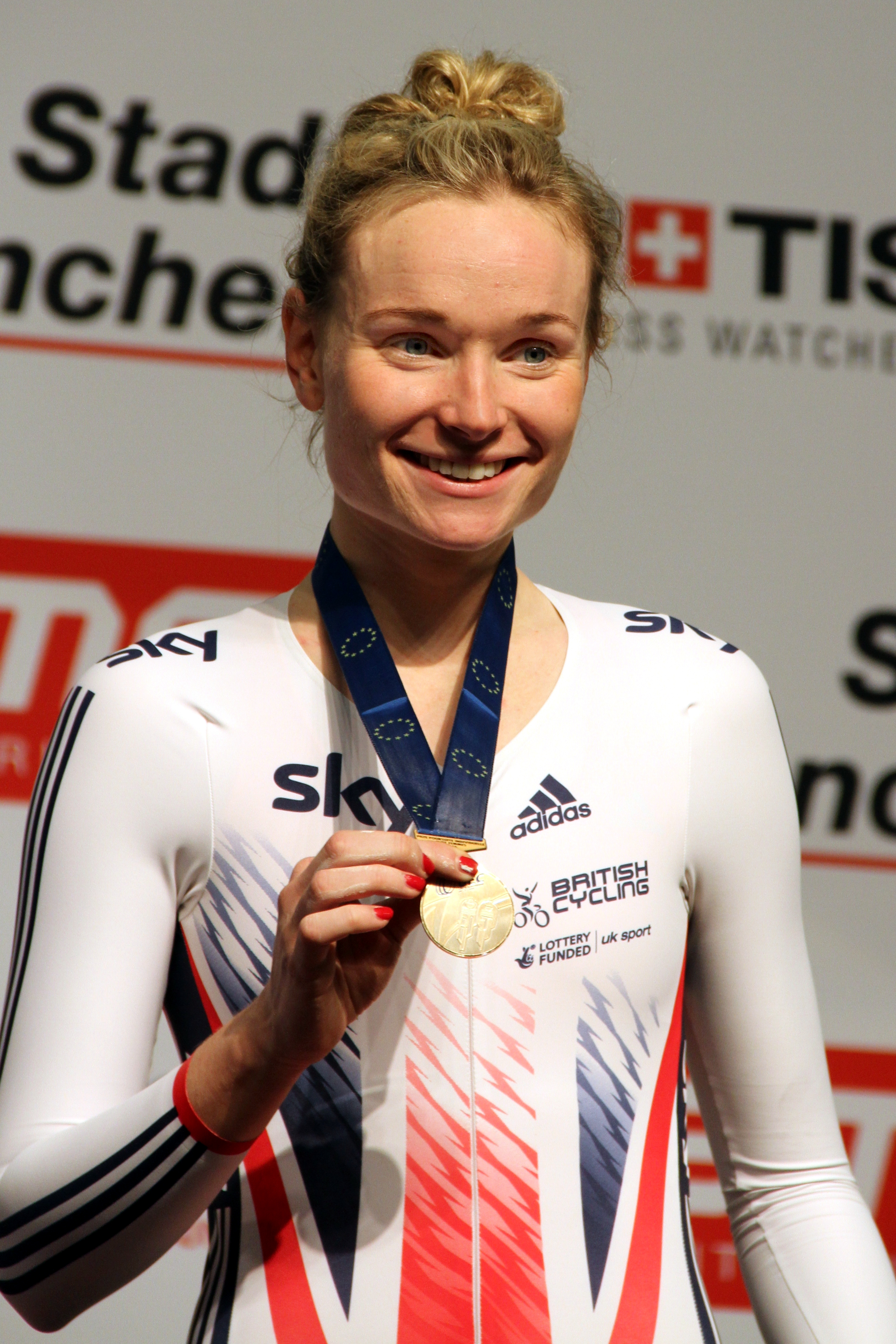 Ciara Horne, britische Radsportlerin The making of this document was supported by the Community-Budget of Wikimedia Germany.